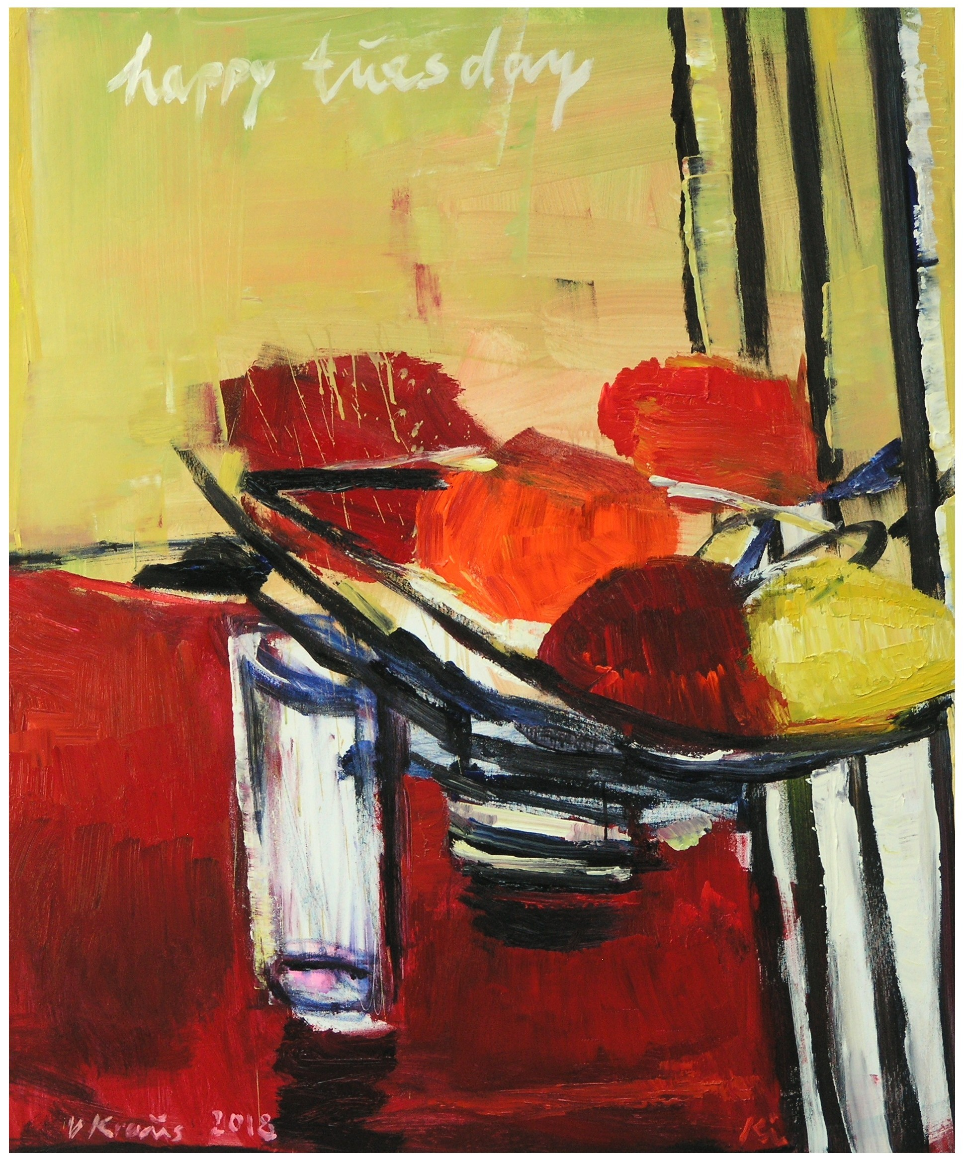 Stillleben, Titel 'Happy Tuesday', Künstler Victor Kraus